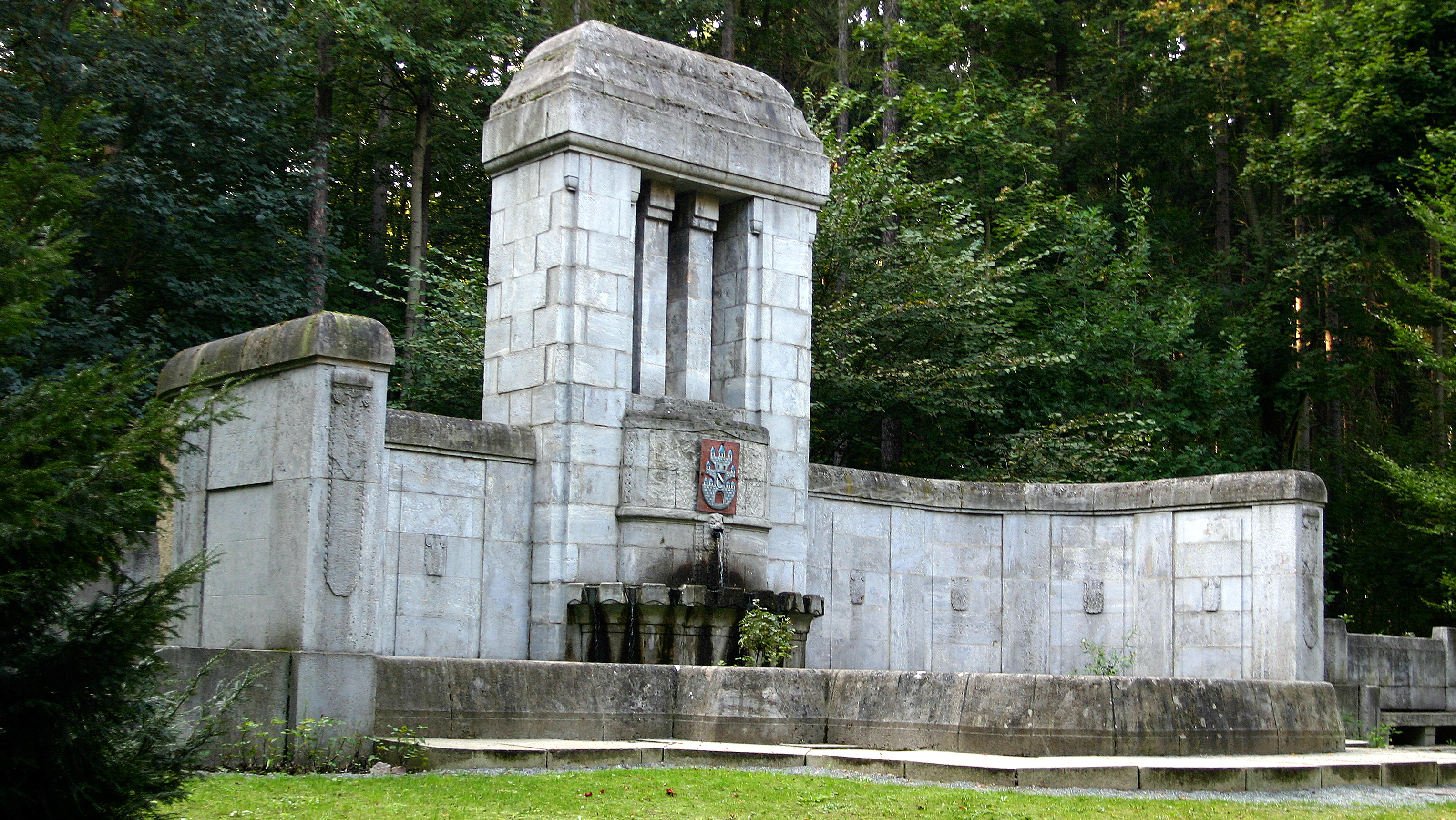 Meerane, Wilhelm-Wunderlich-Ehrung im Wilhelm-Wunderlich-Park